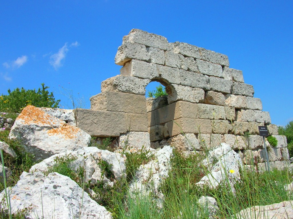 Tratto delle Mura Dionigiane, Belvedere, Sicilia.